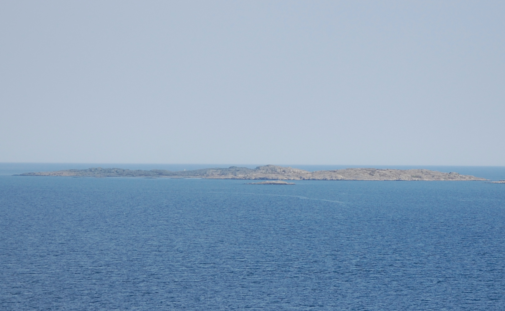 Insel im Schärengarten vor Göteborg